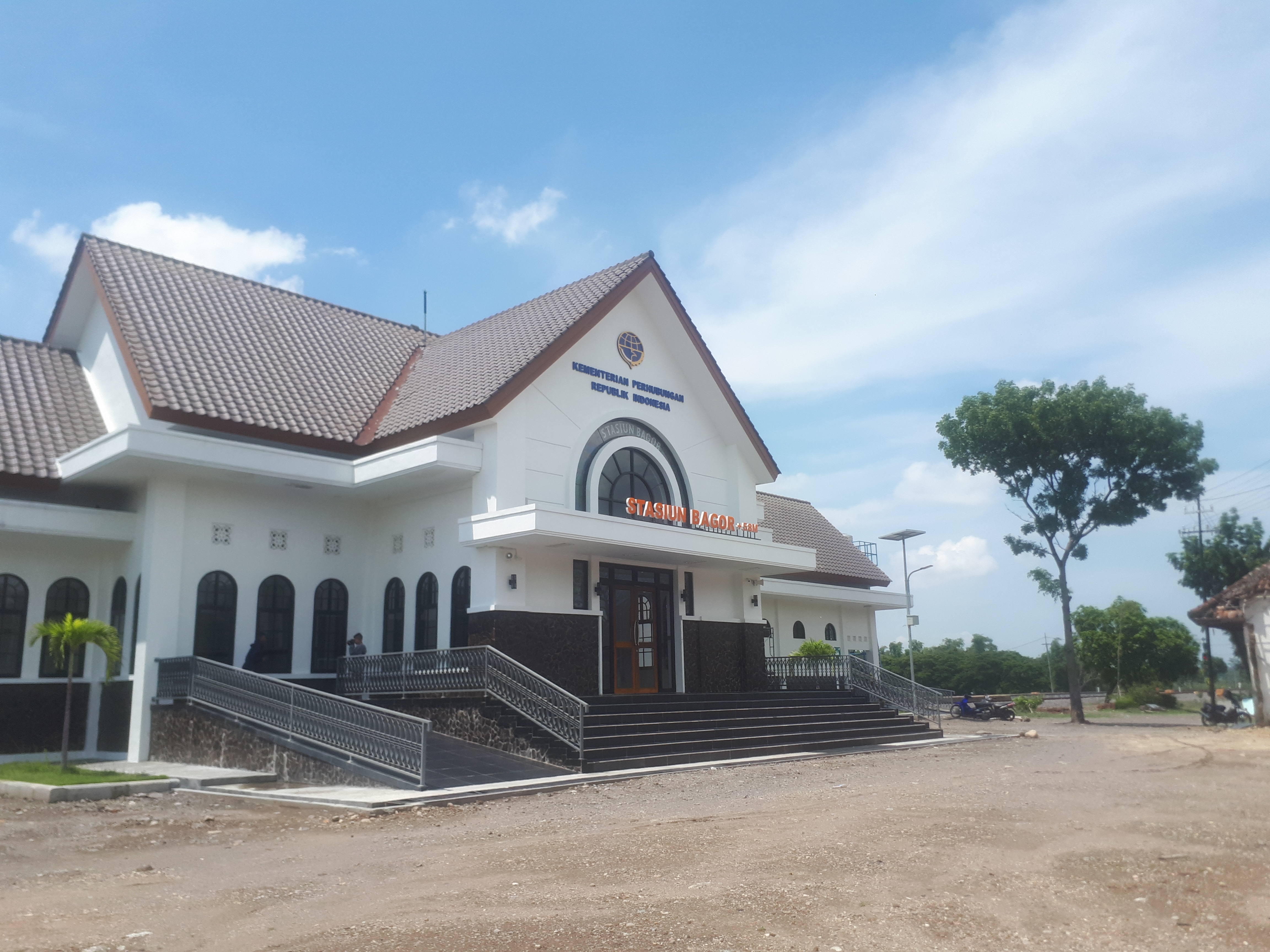 Bangunan Stasiun Bagor baru yang mulai beroperasi pada 30 April 2019 bersamaan dengan aktivasi rel jalur ganda Babadan - Nganjuk.